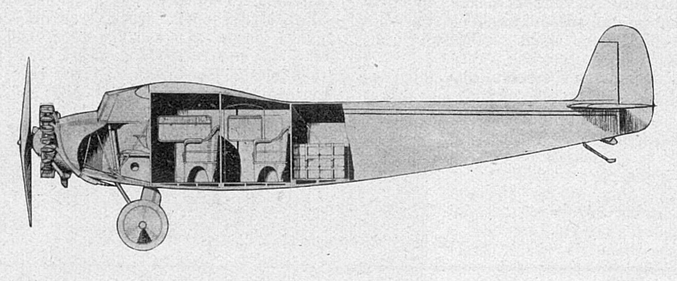 Aero A-35, řez letounem (1928)